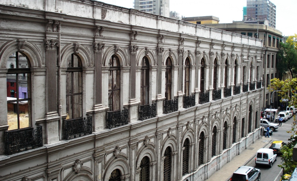 Vista del antiguo edificio del diario Chileno "El Mercurio" de Santiago.